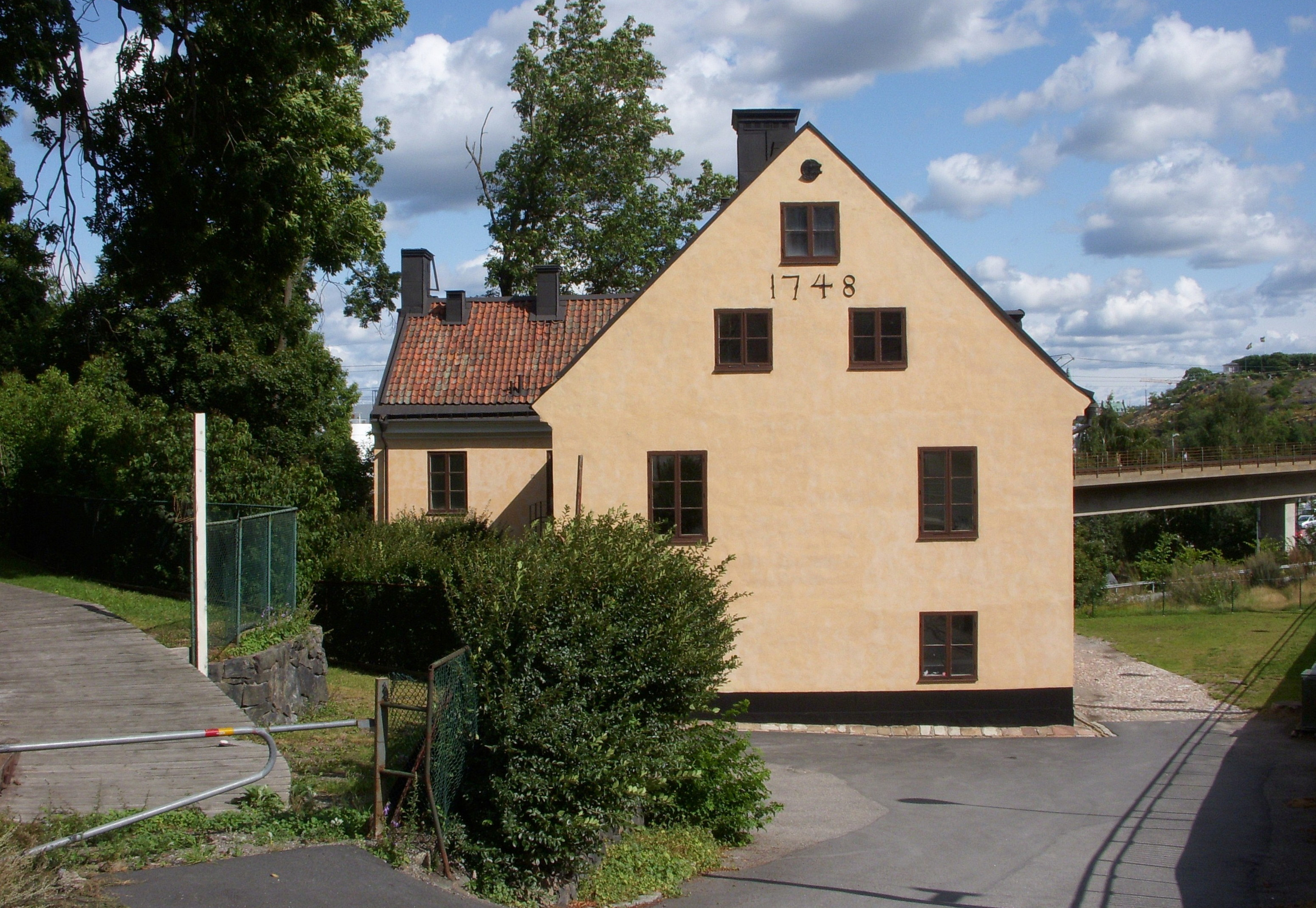 Nedanför Varvsbranten, Södermalm ligger ett ockrafärgat hus med årtalet 1748 på fasaden. Där bodde varvets skeppsbyggmästare